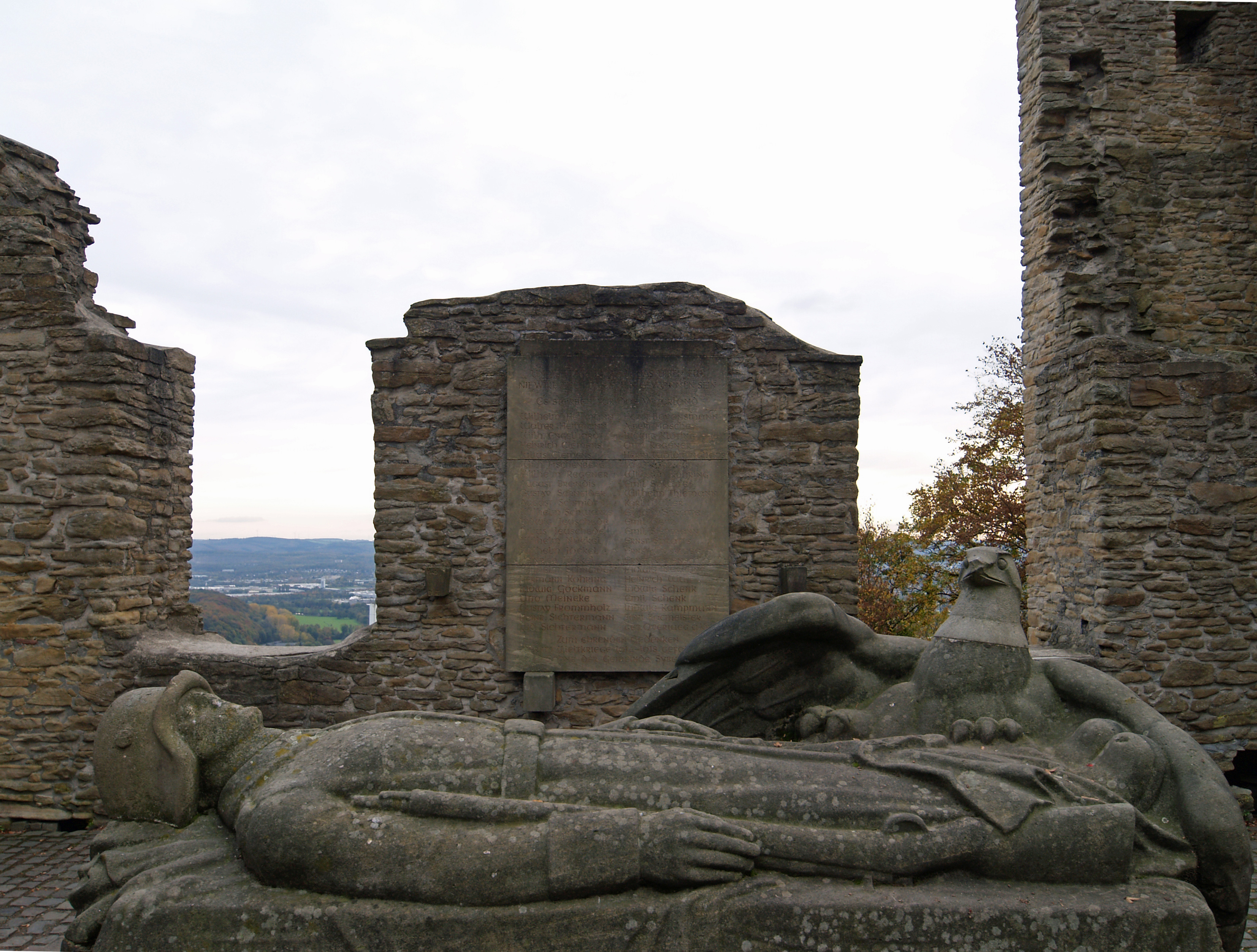 Kriegerdenkmal über dem Ruhrtal in der Hohensyburg-Ruine in Dortmund